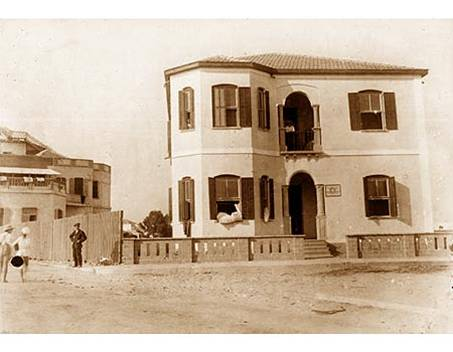 בניין המעבדות המשוכלל של בית החולים ברחוב מזא"ה.